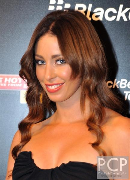 Tamara Jaber